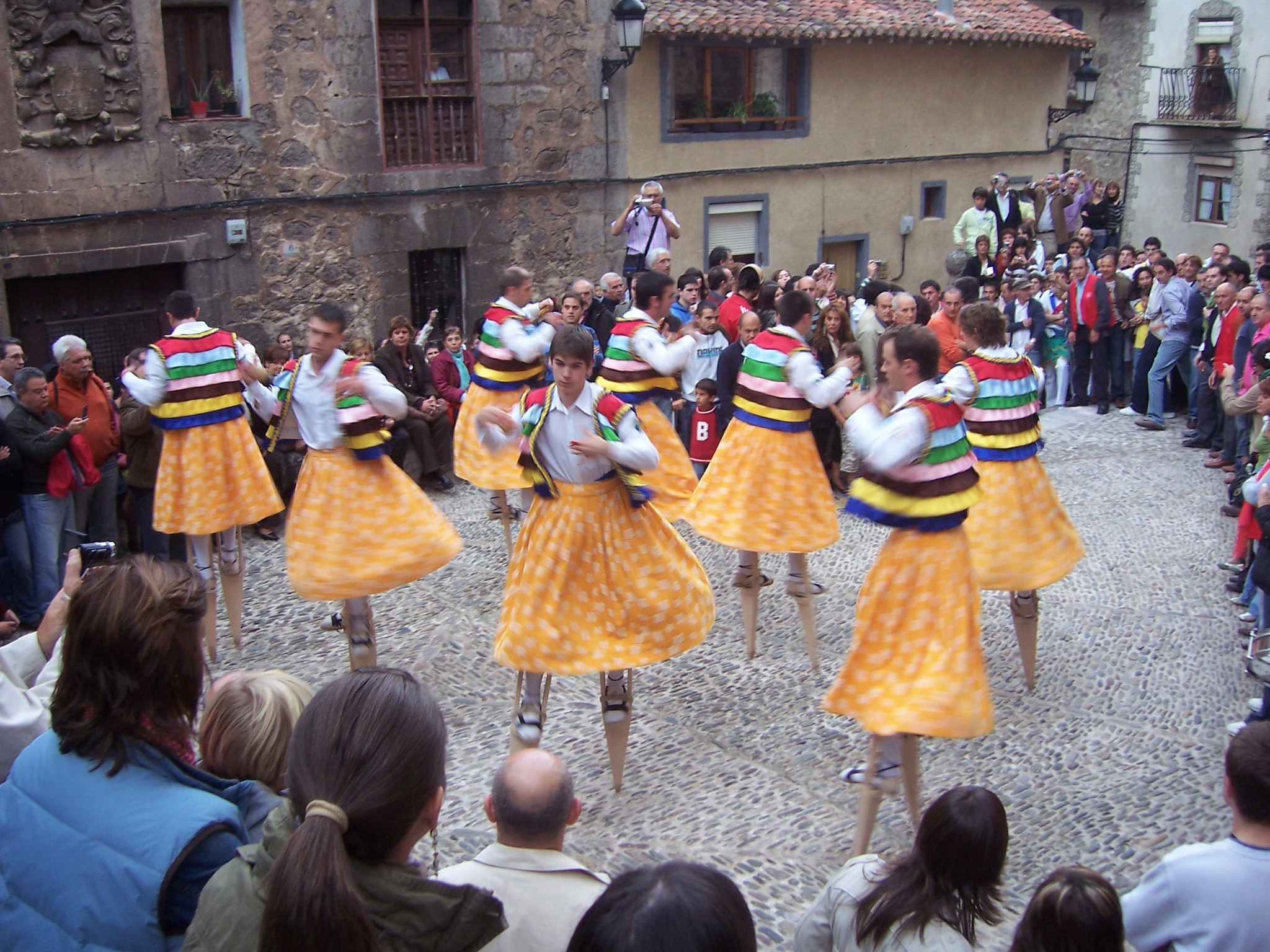 Danzadores de zancos en la plaza de la Obra de Anguiano, La Rioja (España)